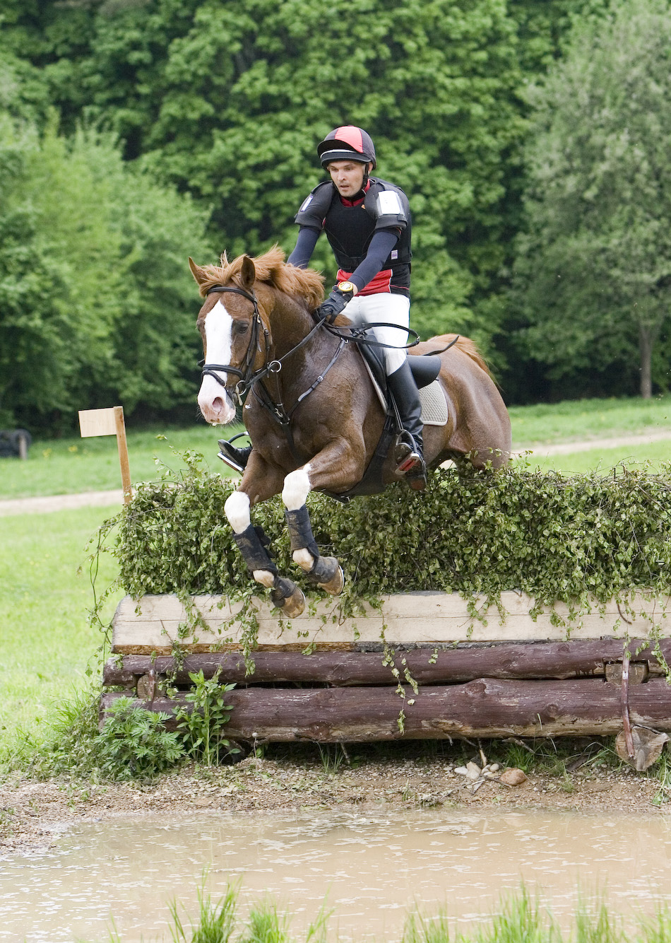 Dangis Rakauskas žirgas Westo S "Butkaus Taurė" 2011